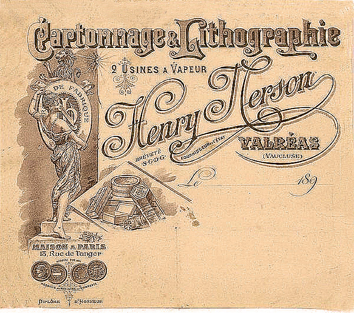 Carte de visite de l'usine de cartonnage Henry Merson à Valréas